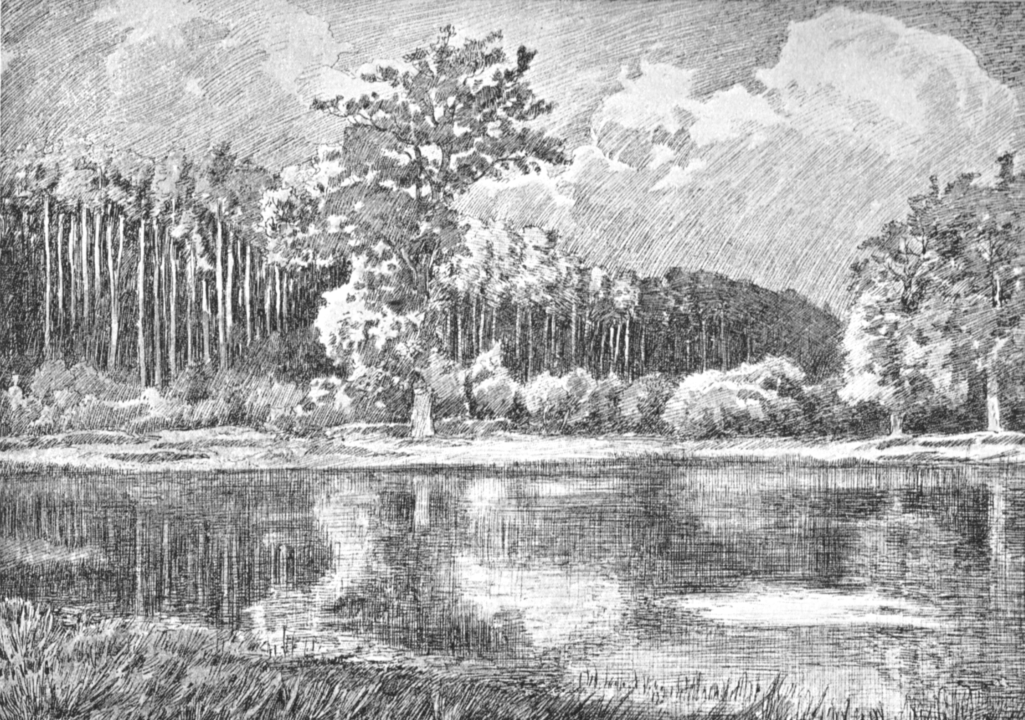 Waldweiher im Sachsenwald, Zeichnung um 1895